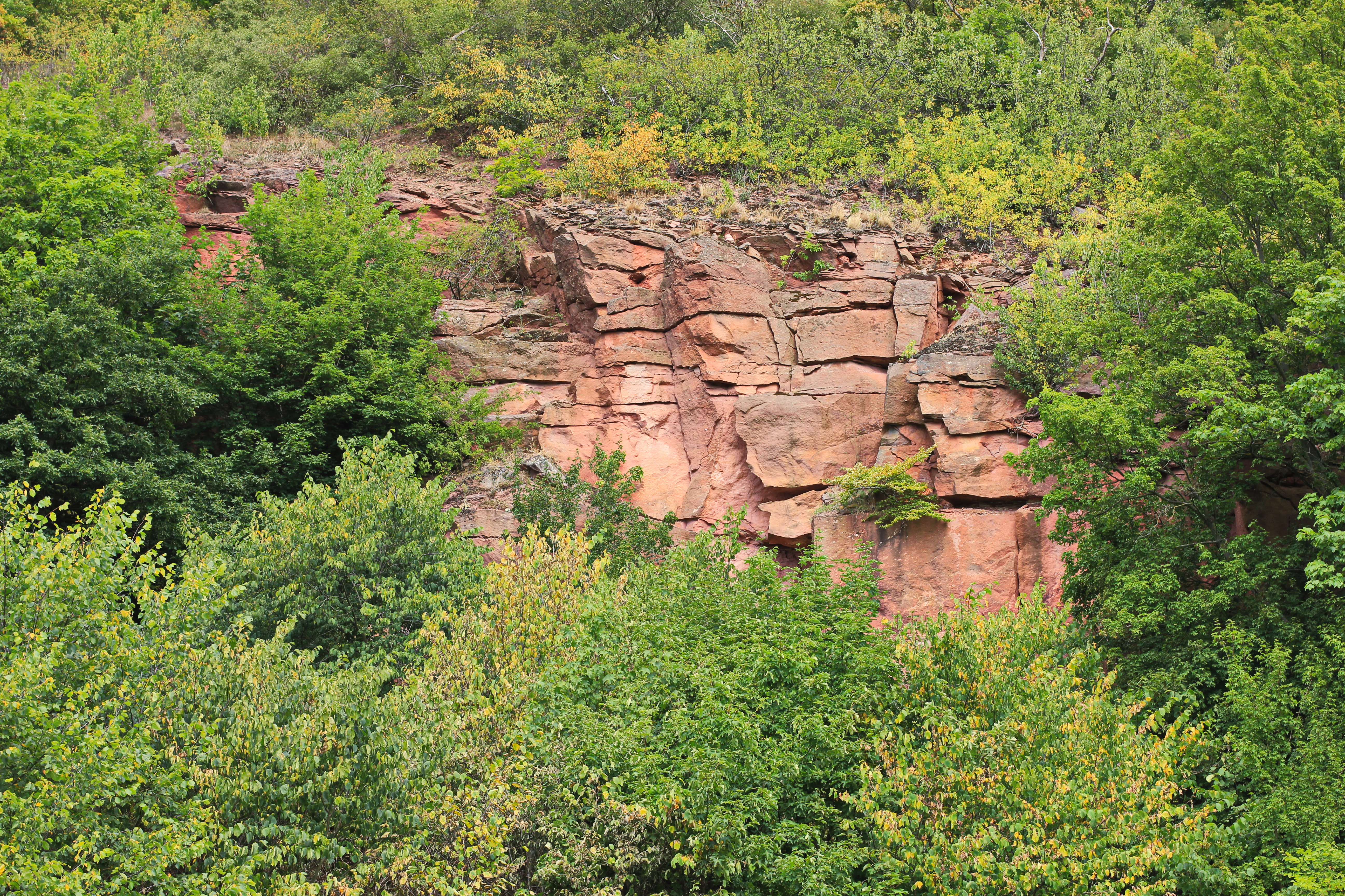 Aufgenommen im Naturpark Kyffhäuser (Felsen auf dem Weg vom Parkplatz in Richtung Kyffhäuser-Denkmal).